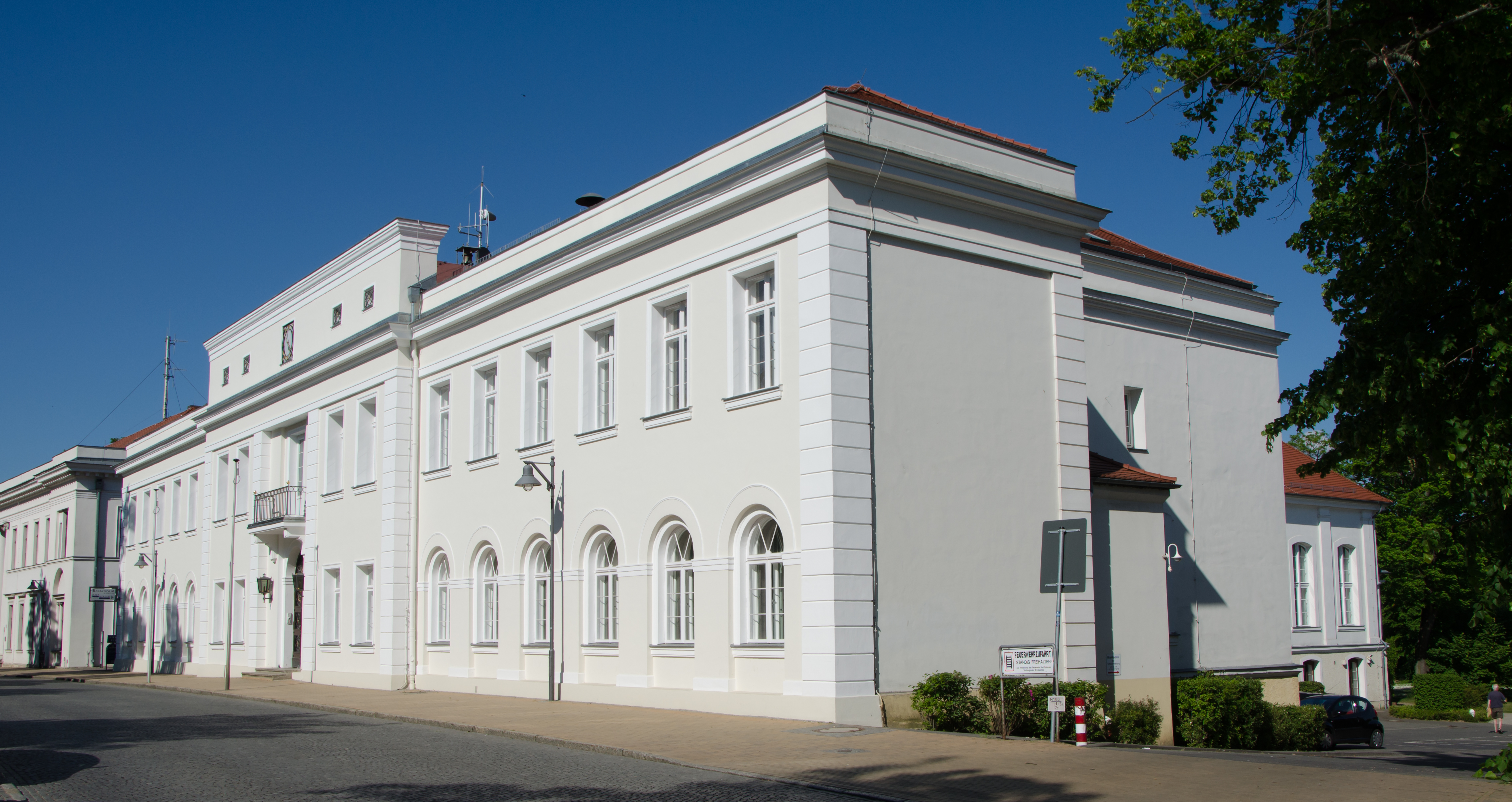 Salongebäude am Kamp , Bad Doberan